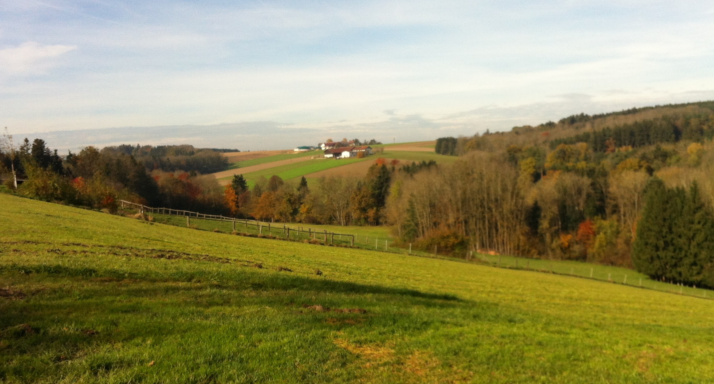 Blick von Burdberg nach Nordwesten